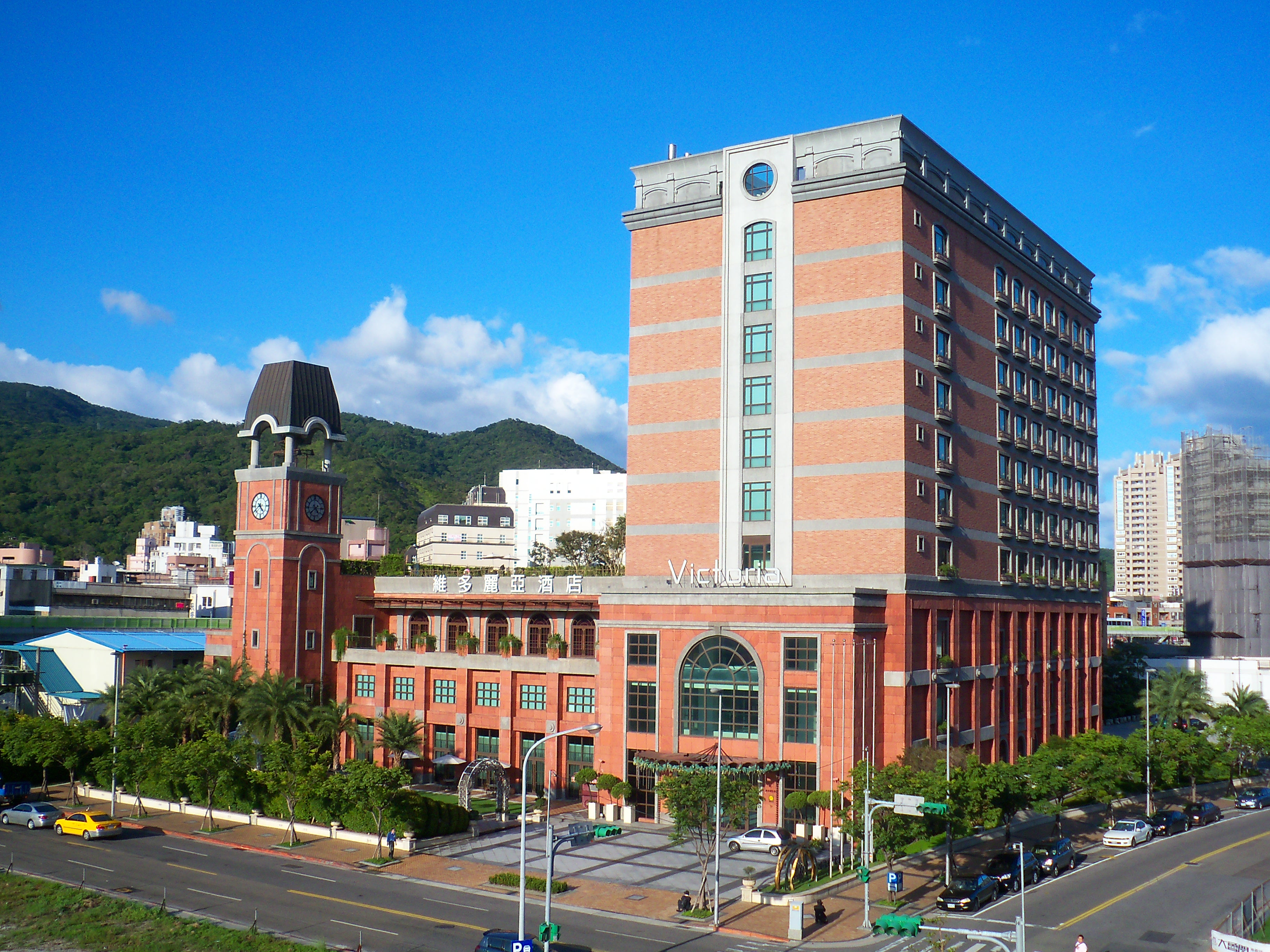 グランドビクトリアホテル、所在地：台北市中山区敬業四路168号。